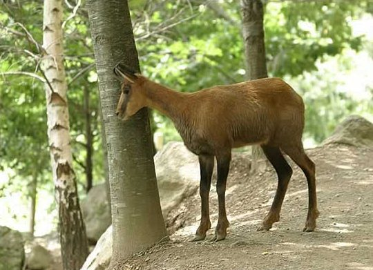 Isard des Pyrénées (Rupicapra pyrenaica) en Bigorre